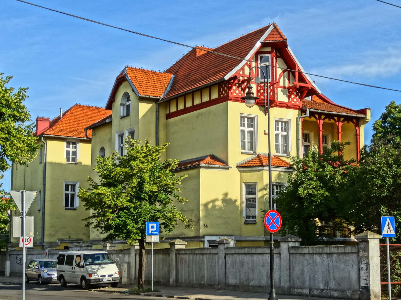 Willa przy ul. Gdańskiej 84 w Bydgoszczy (1898-1899)